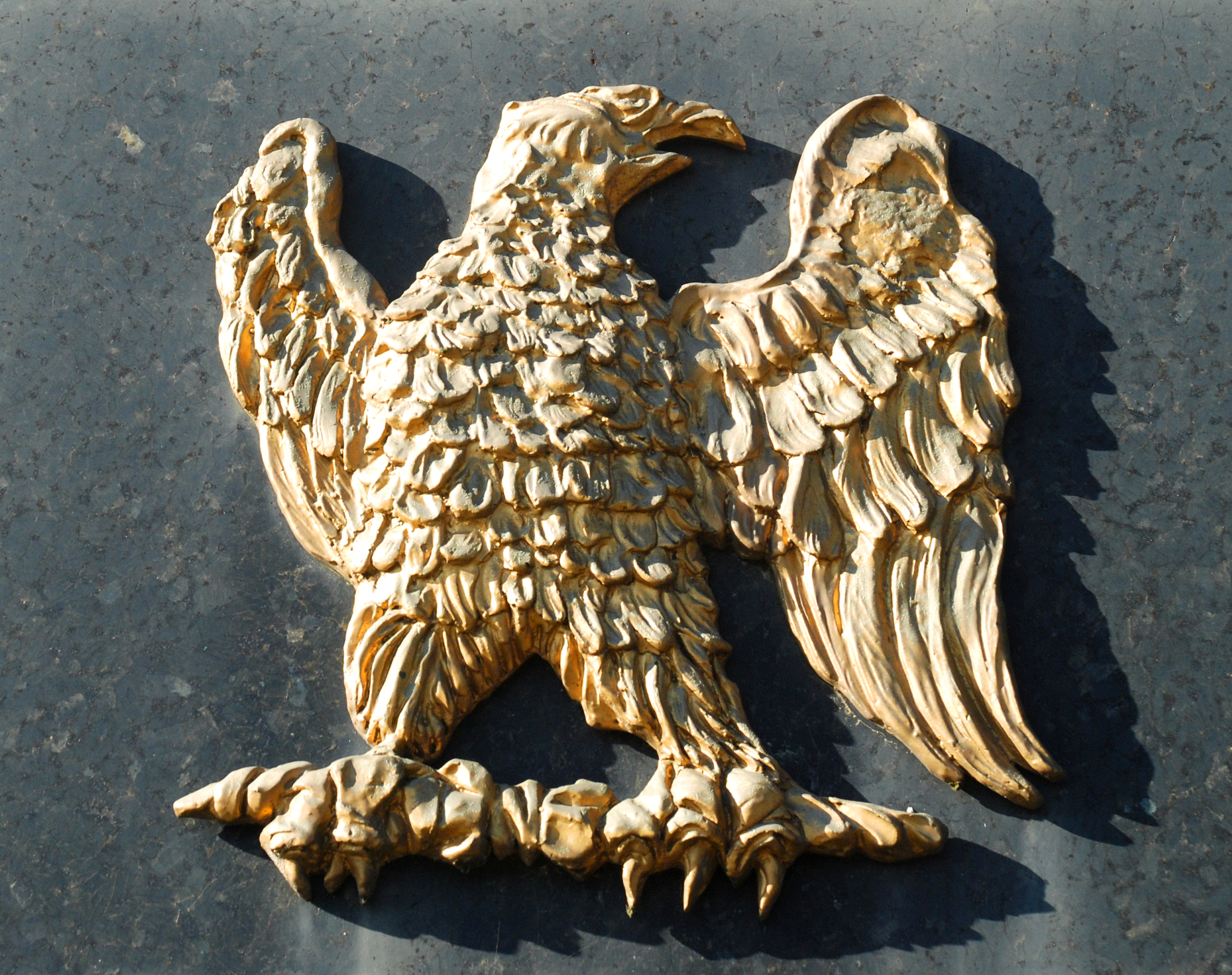 Belgique - Brabant wallon - Lasne - Plancenoit - Ferme de la Haie Sainte (bataille de Waterloo)